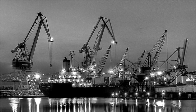 Industriehäfen bei Nacht